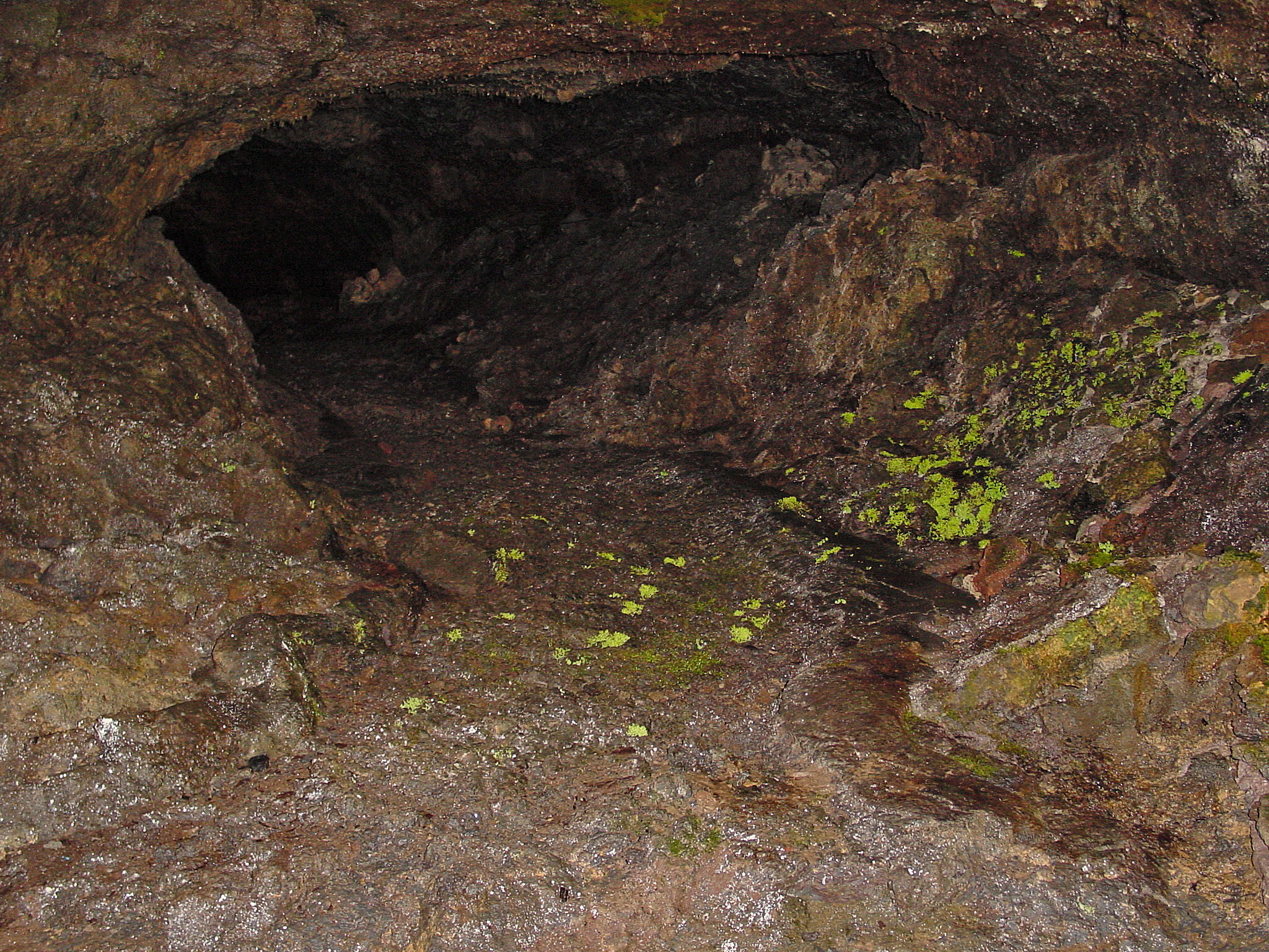 São Vincente caves, Madeira. - OpenStreetMap (Info) Other photos